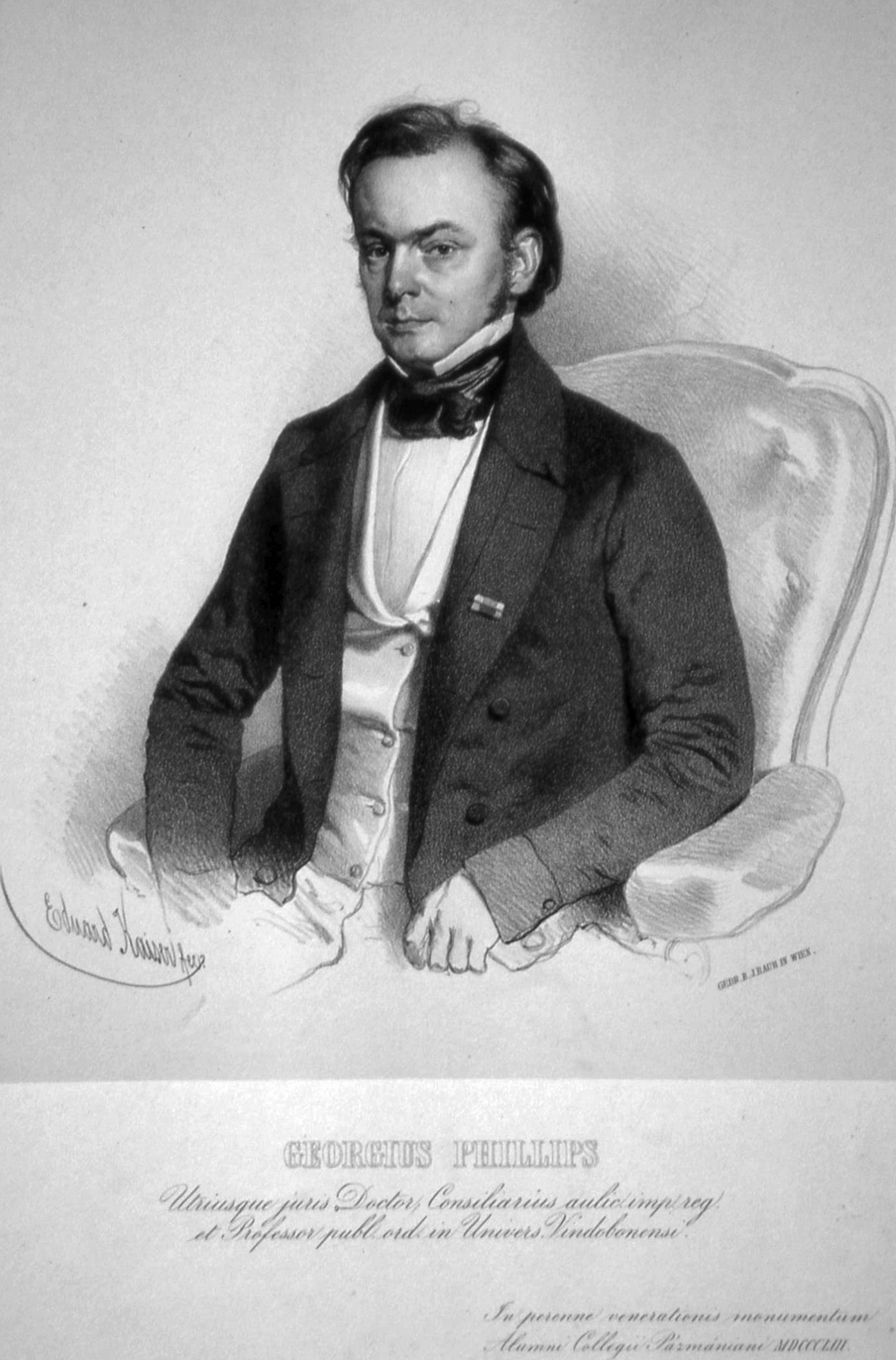 Georg Phillips (1804-1872), Rechtshistoriker. Lithographie von Eduard Kaiser, 1853